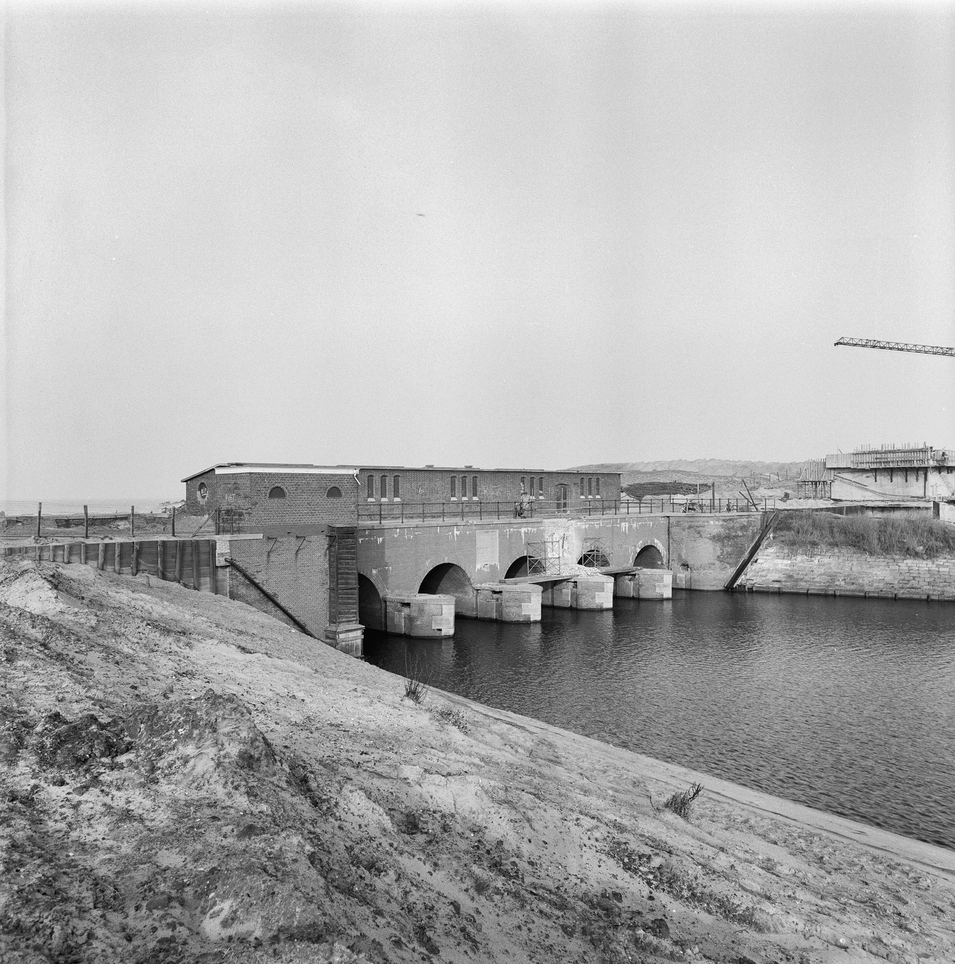 Buitensluis: overzicht landzijde tijdens het begin van de gedeeltelijke sloop.